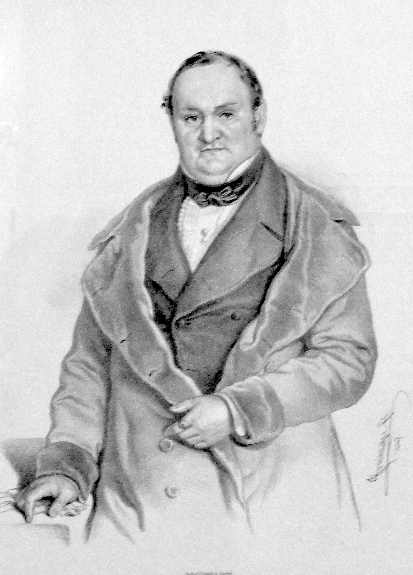 Johannes Baur, Gründer des Baur au Lac und Baur en Ville